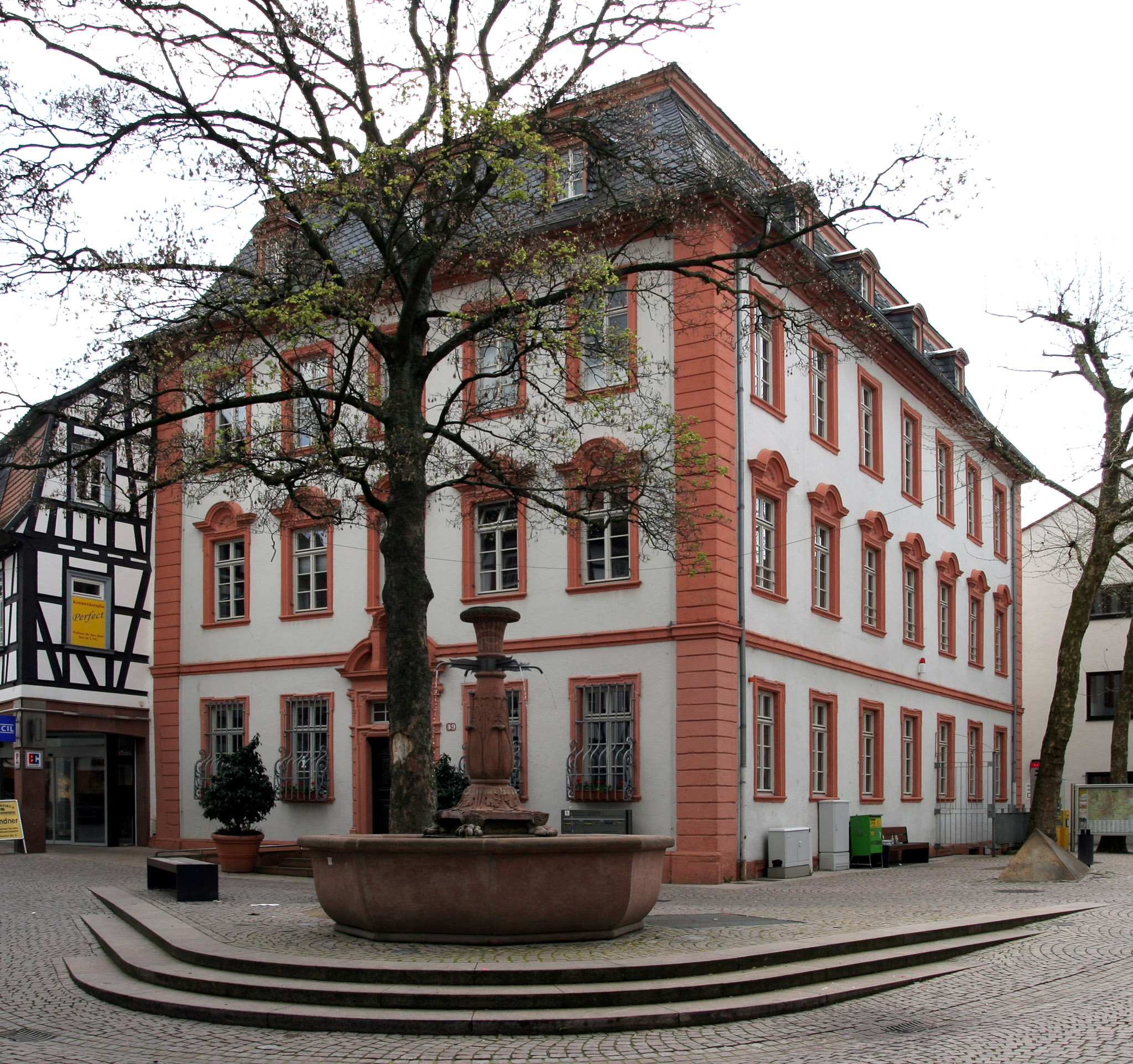 Das unter Denkmalschutz stehende Haus Nr. 39 in der "Hauptstraße" der Stadt Bensheim